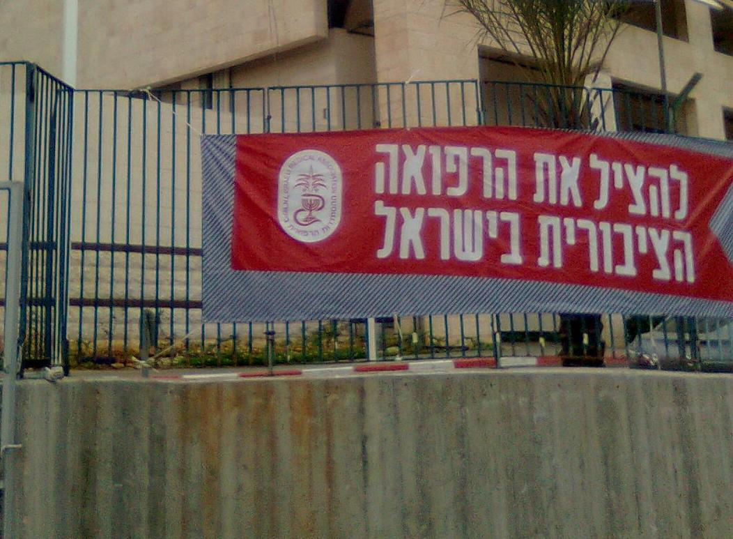 שלט בכניסה לבית החולים בילינסון, 21 באפריל 2011